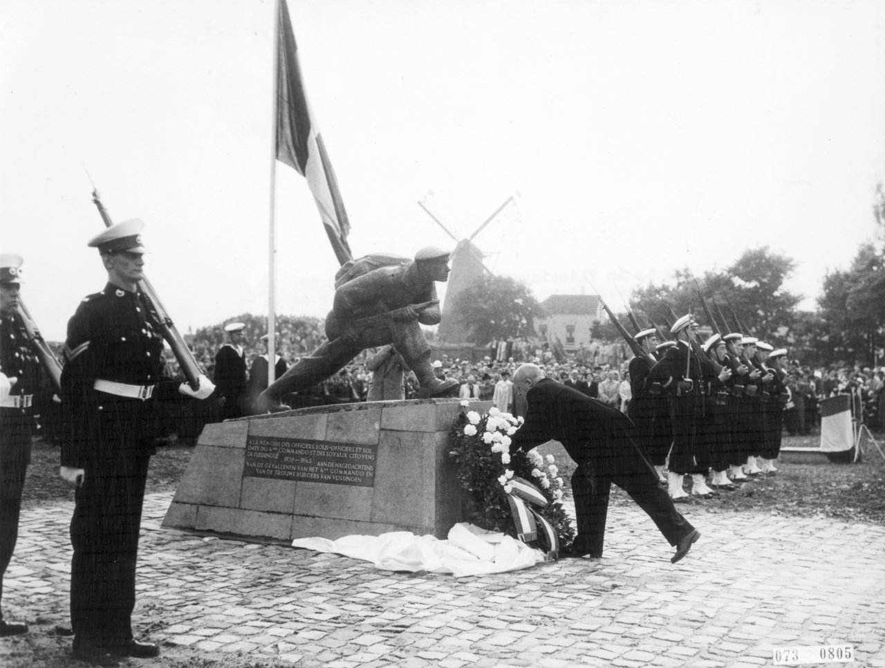 Onthullling beeld voor de gevallen engelse bevrijders. Het Nationaal Monument voor de 4e Commando Brigade herinnert de inwoners van Vlissingen aan de strijd die door deze vrijwilligers van de British Liberation Army is geleverd tijdens de bevrijding van Walcheren. Bij de gevechten kwamen 81 Britse en 22 Franse soldaten om het leven. Collectie: Fotocollectie Elsevier Fotograaf: Onbekende Anefo fotograaf Datum: 31-05-1952 Bestanddeelnummer 073-0805 Original at Nationaal Archief with id